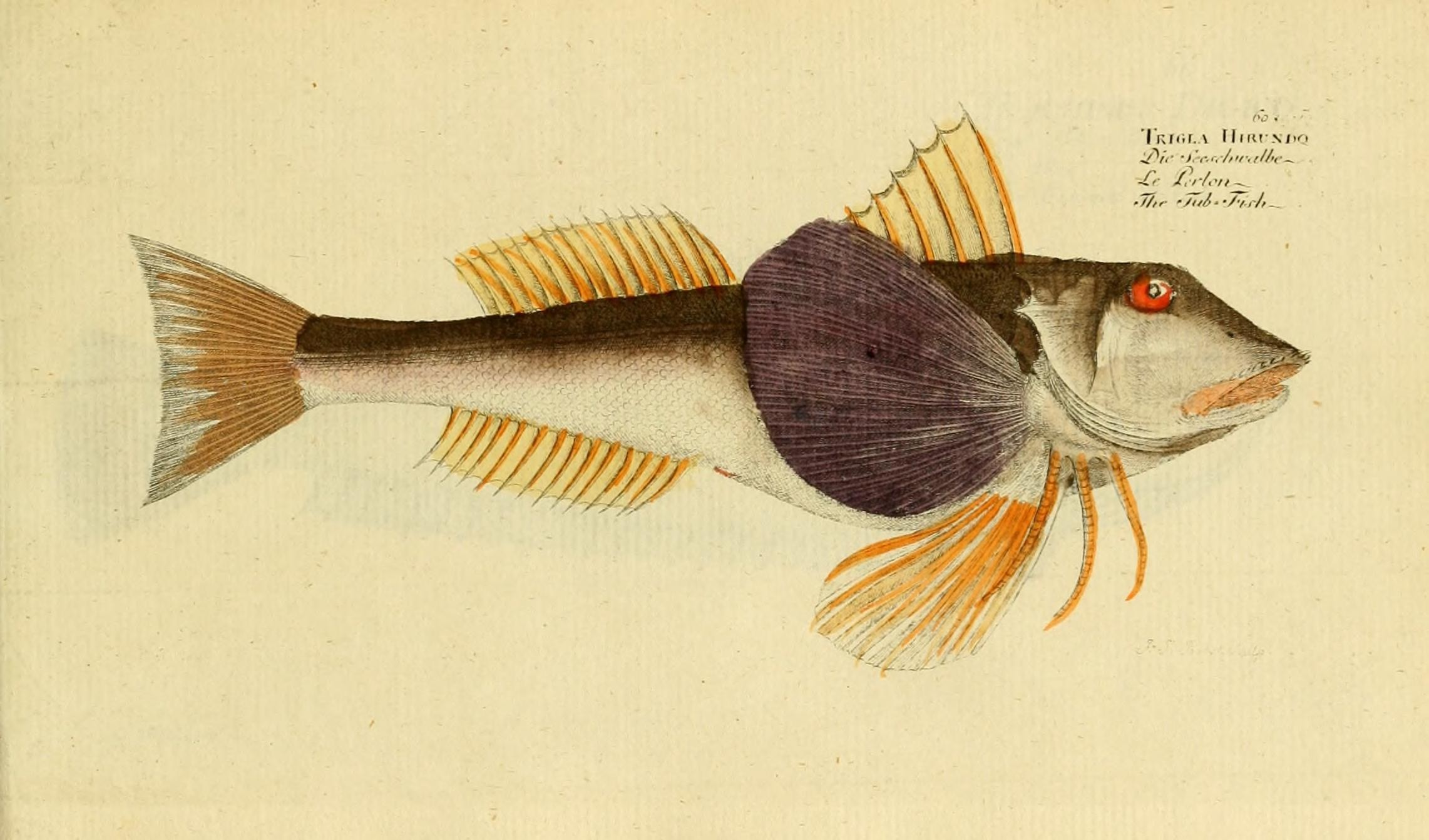 Chelidonichthys lucerna syn. Trigla hirundo Ichthyologie; ou, Histoire naturelle des poissons : En six parties avec 216 planches dessinées et enluminées d'après nature / par Marc Éliéser Bloch.